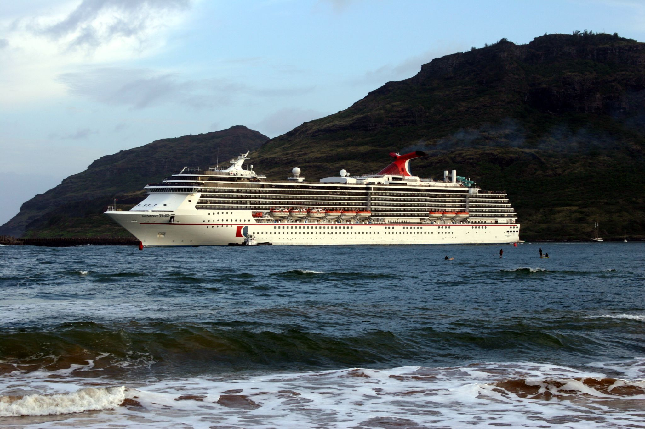 Carnival Spirit departing from Kauai